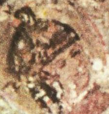 Miniatura de Iván Asen IV en la crónica de Manasés